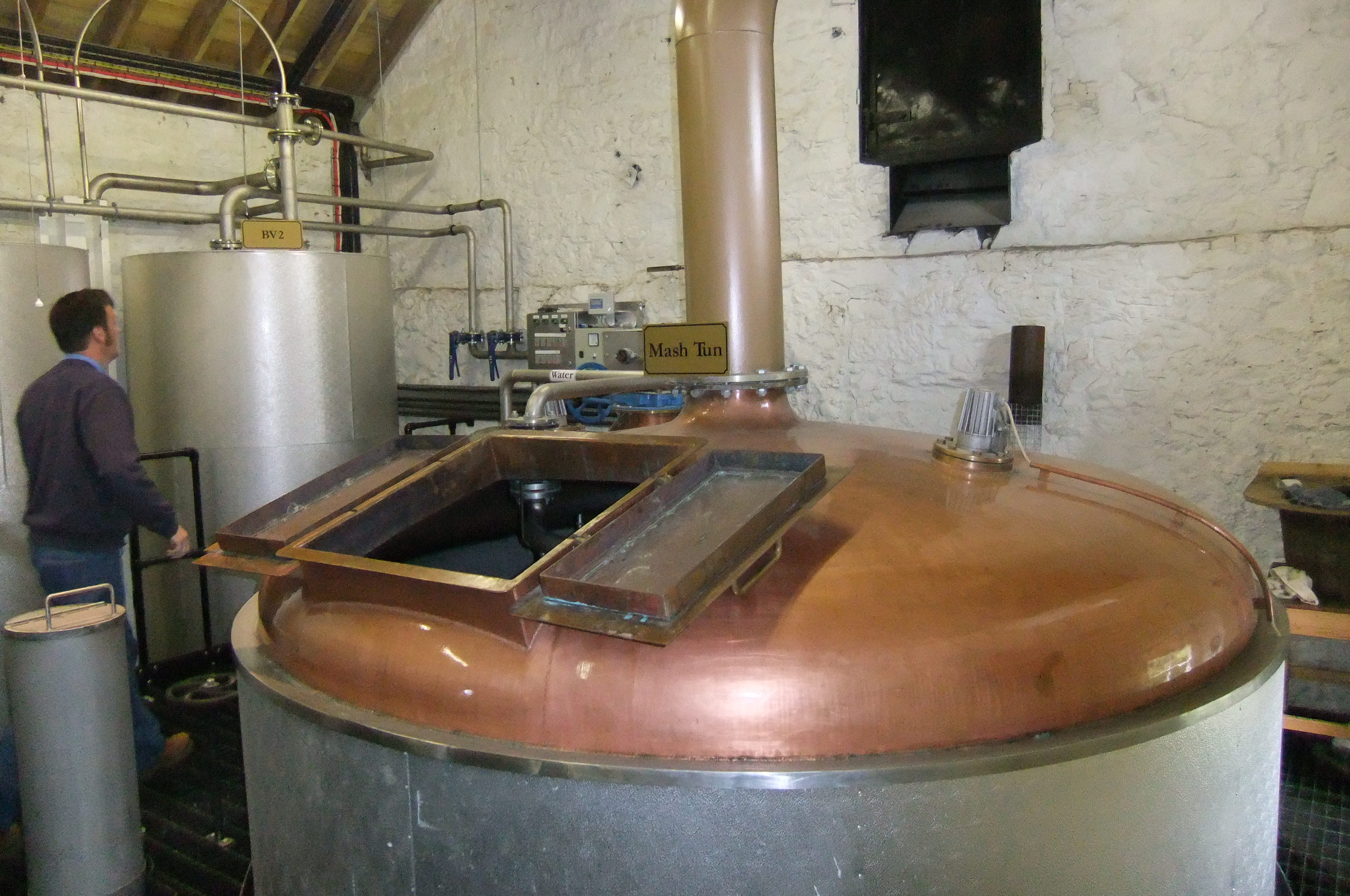 Masichbottich der Daftmill Destillery